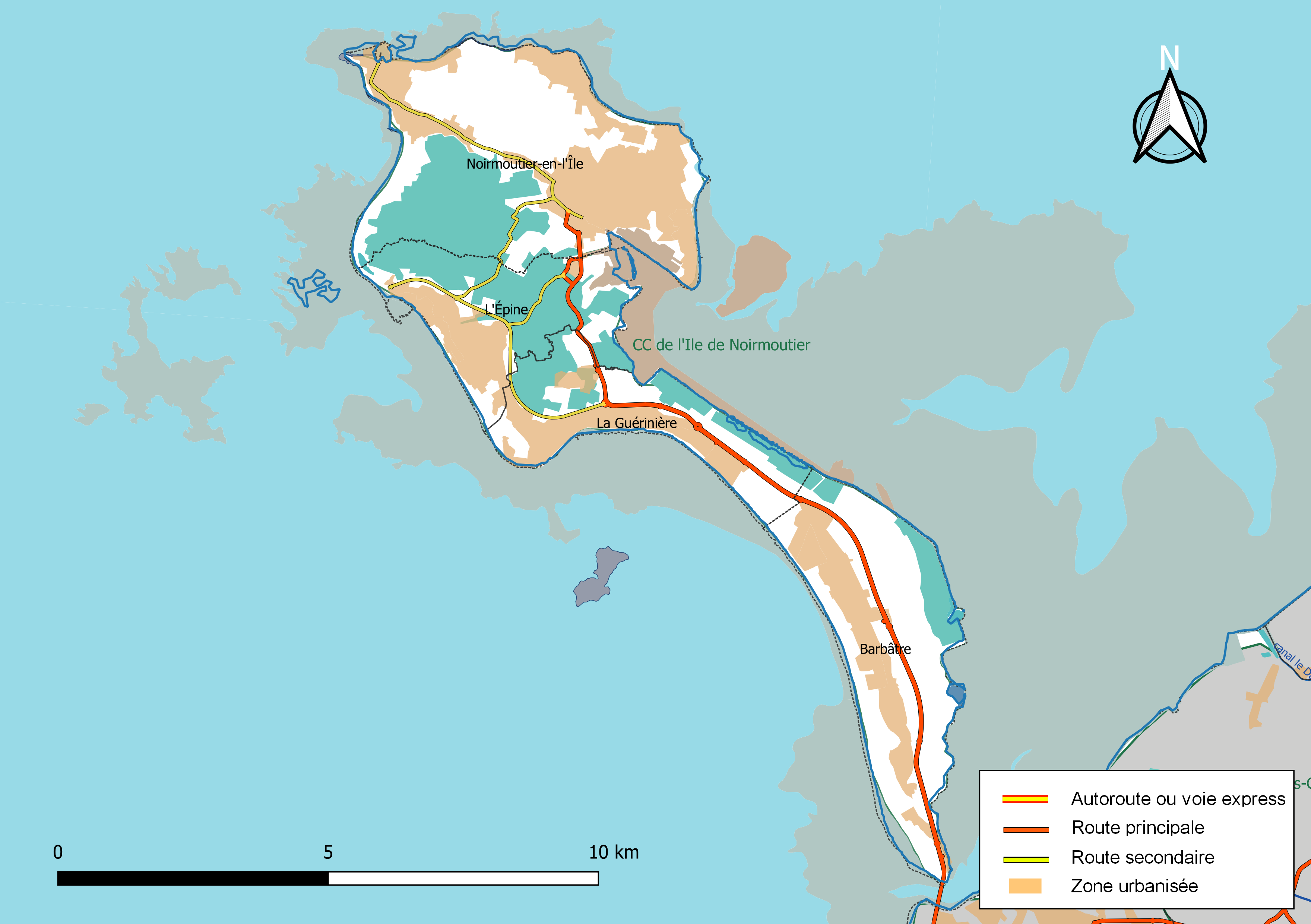 Carte géographique de la Communauté de communes de l'île de Noirmoutier, département de la Vendée, France. Composition au 1er janvier 2019.